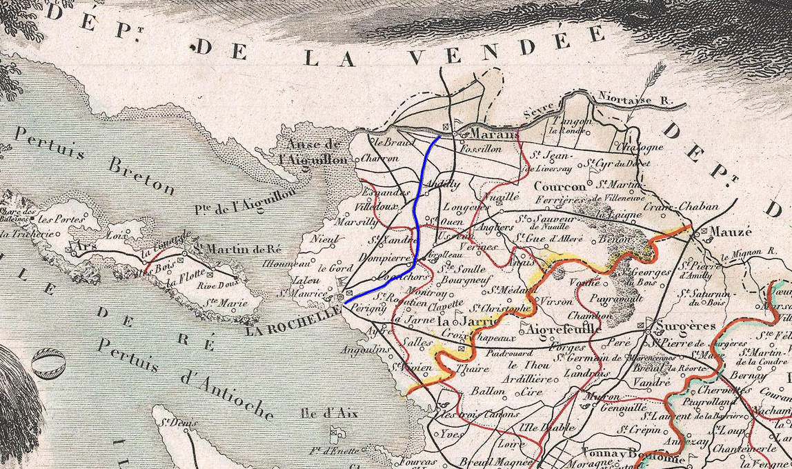 Le Canal de Marans à La Rochelle sur une carte Levasseur de 1852 (tracé en bleu) (Charente-Maritime - France).